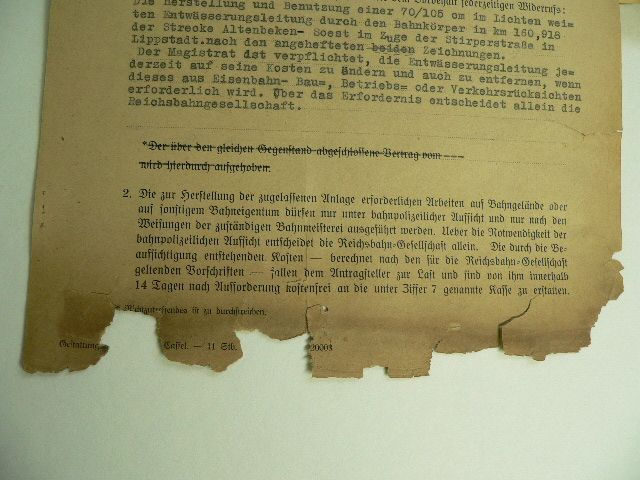 Beispiel für Schäden durch Saures Papier